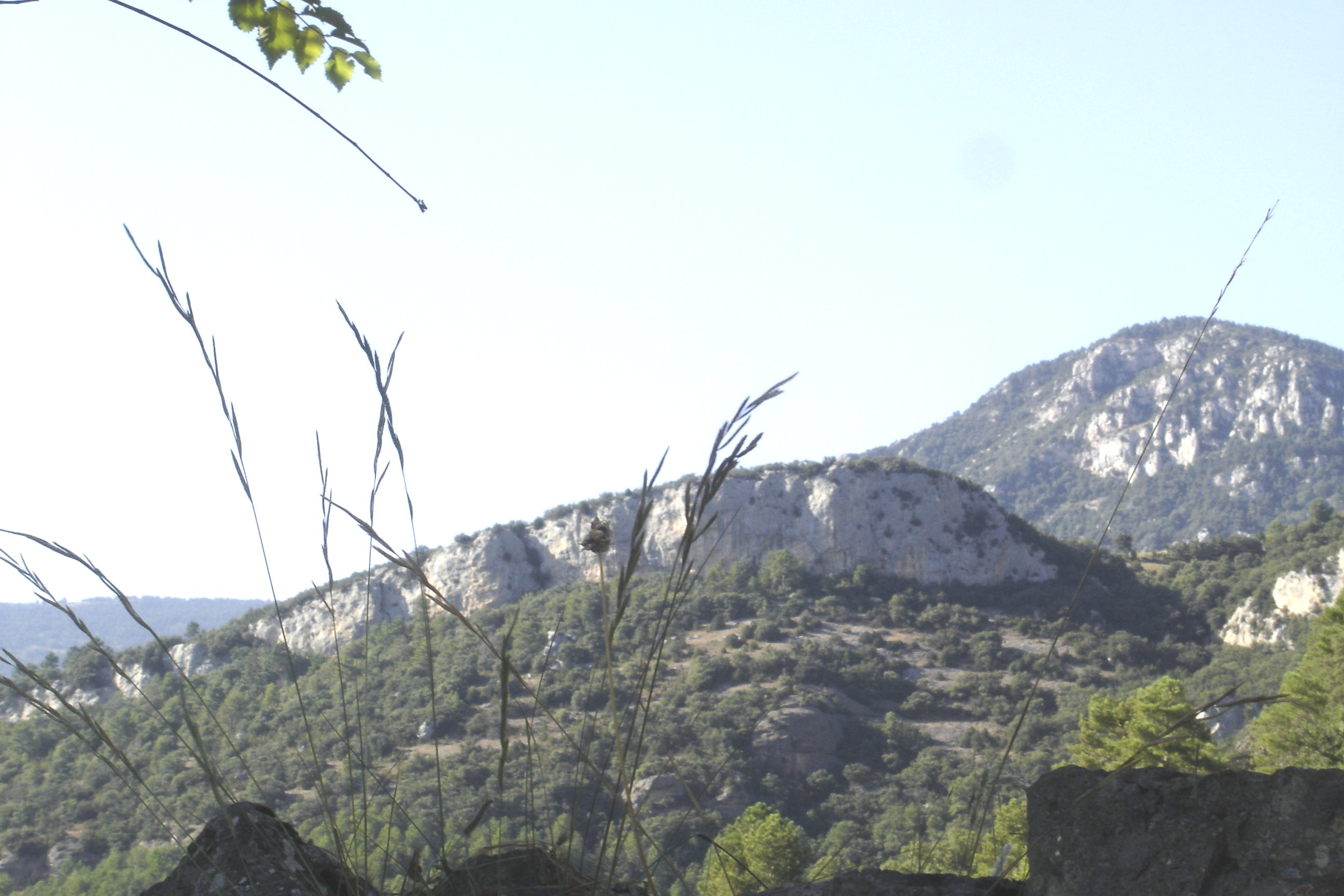 La cinglera de Cavallera (Odèn) (Solsonès) vista des de la masia de Junyent